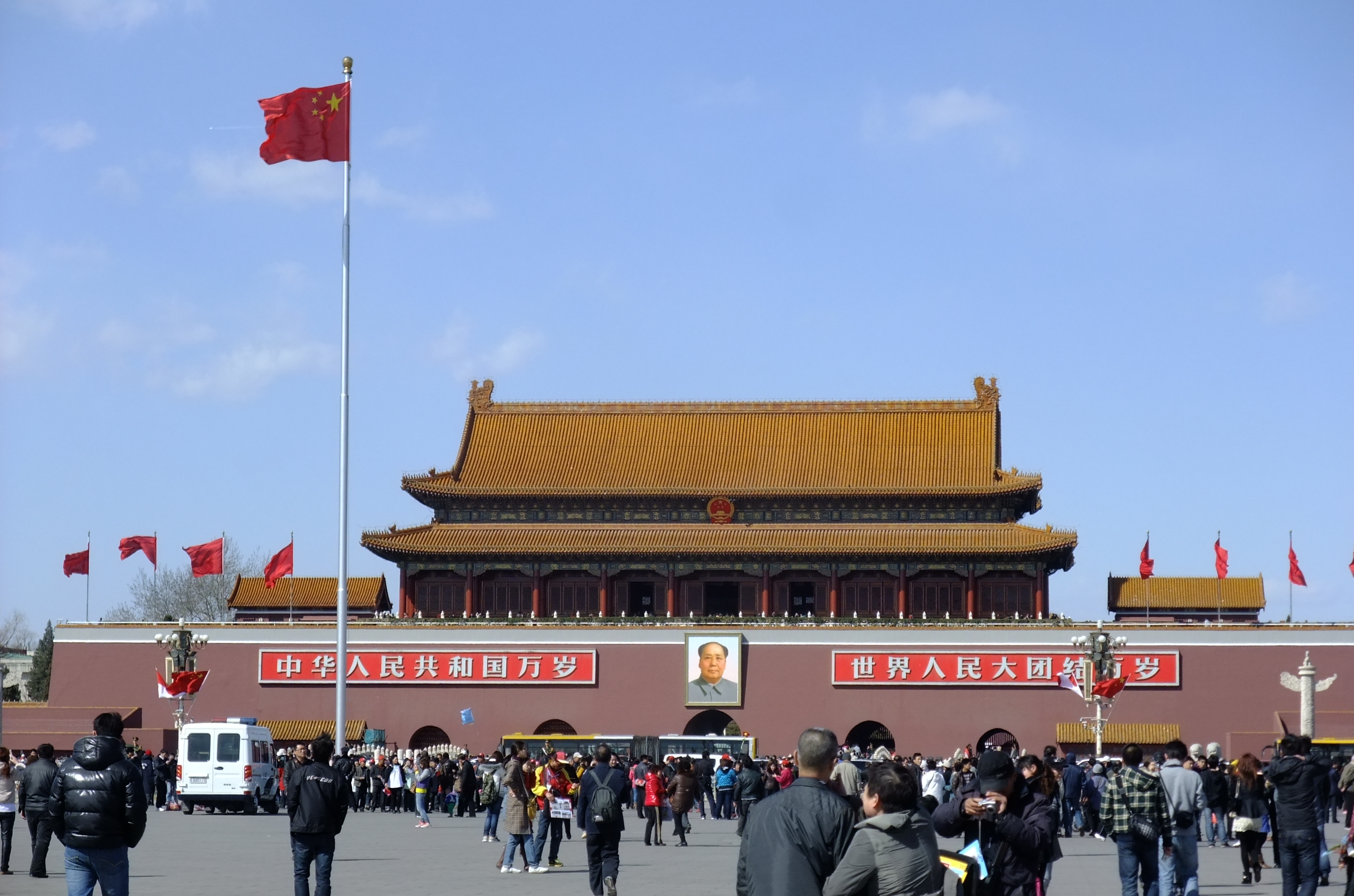 巡道工出品 Photo by Xundaogong